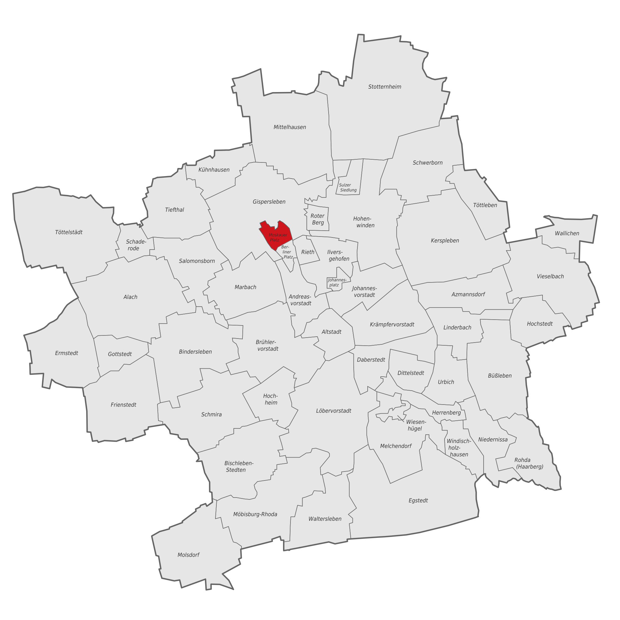 Karte des Stadtgebietes von Erfurt mit Hervorhebung des Ortsteiles Moskauer Platz